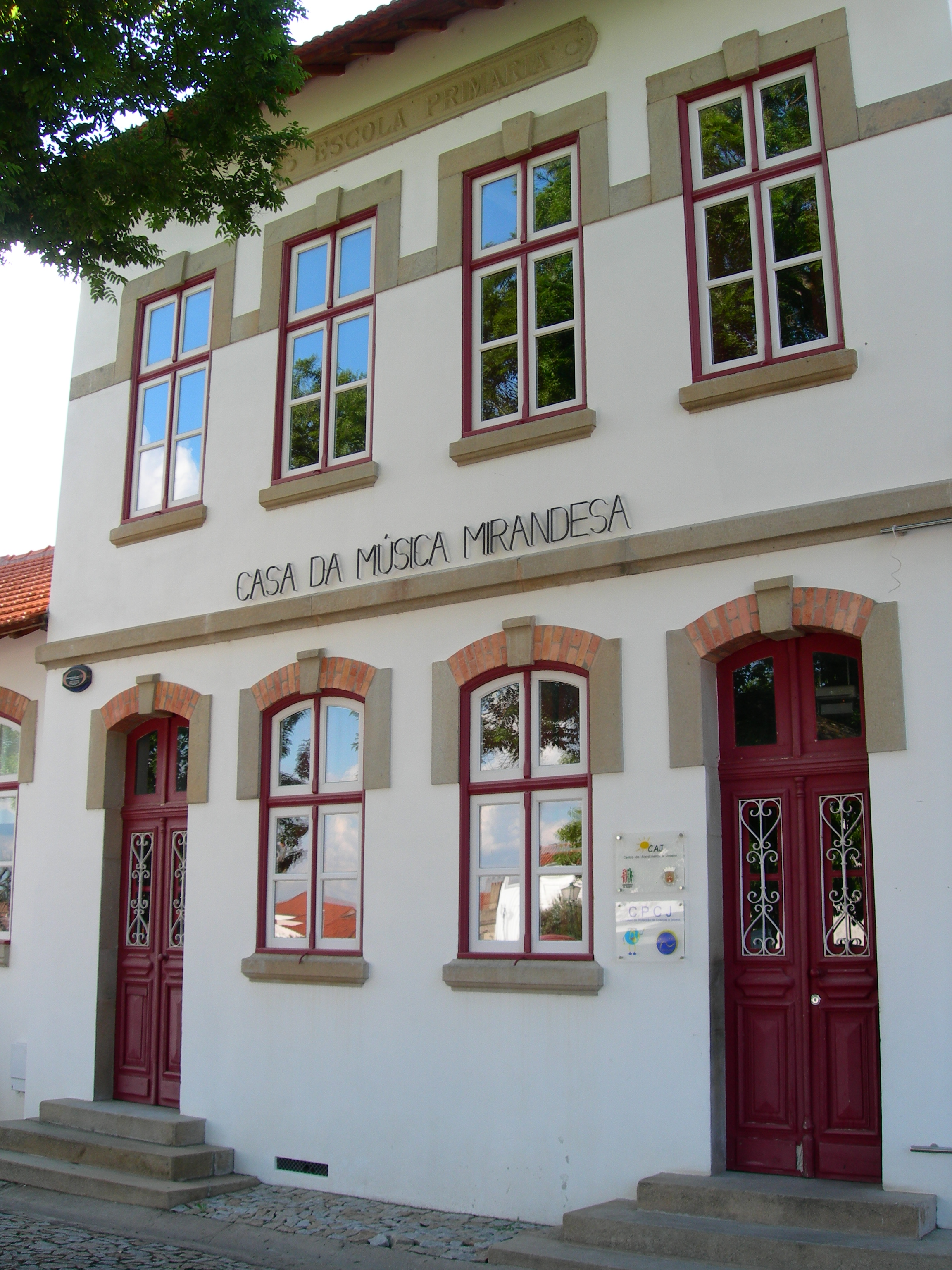 Casa da Música Mirandesa This building is classified as Incluído em sítios classificados. This file was uploaded for Wiki Loves Monuments in Portugal with the unique identifier 97030657.